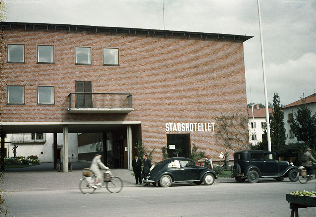 The City Hotel in Karlskoga at Alfred Nobel Square. The car to the left is a Volkswagen "Beetle" or "Bug". Stadshotellet i Karlskoga vid Alfred Nobels torg. Bilen till vänster är en Volkswagen "Bubbla". Byggnadsår 1939-40. arkitekt Sune Lindström Parish (socken): Karlskoga Province (landskap): Värmland Municipality (kommun): Karlskoga County (län): Örebro Photograph by: Fredrik Bruno Date: 1950 Format: Colour slide Persistent URL: Read more about the photo database (in english)